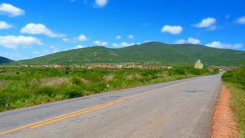 distrito de Algodões